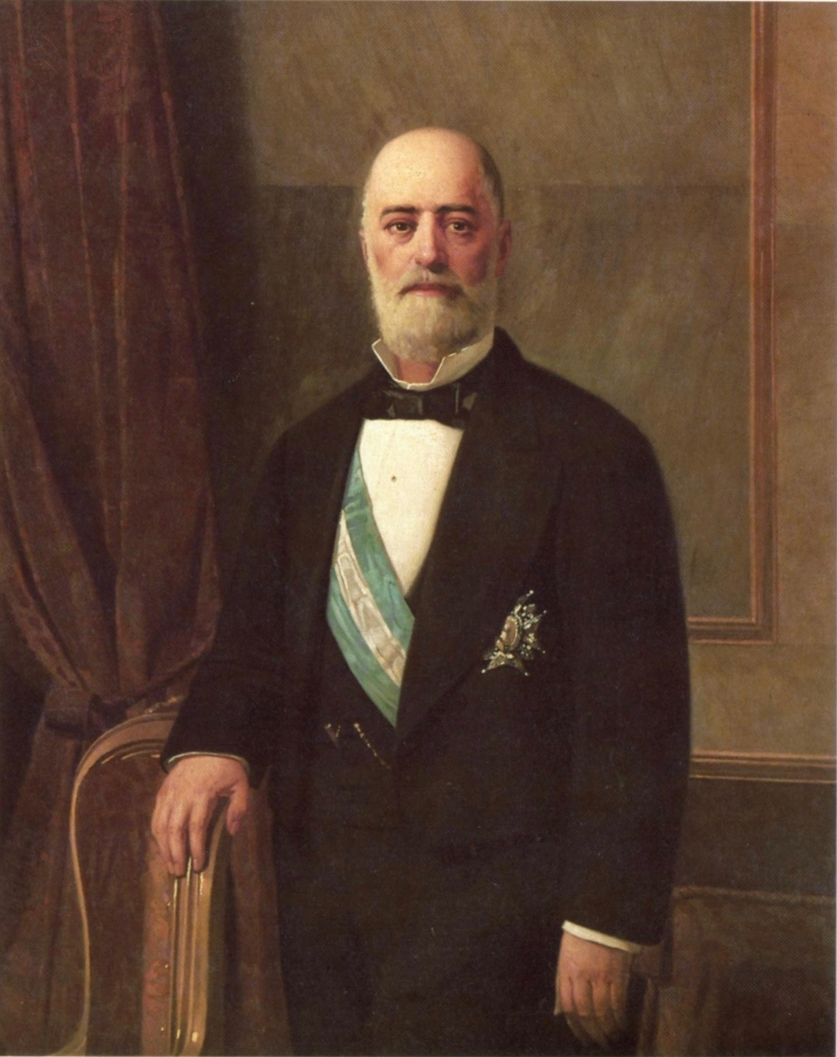 Martín Belda y Mencía del Barrio